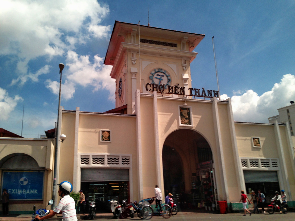 Cho Ben Thanh, q1 tphcmvn